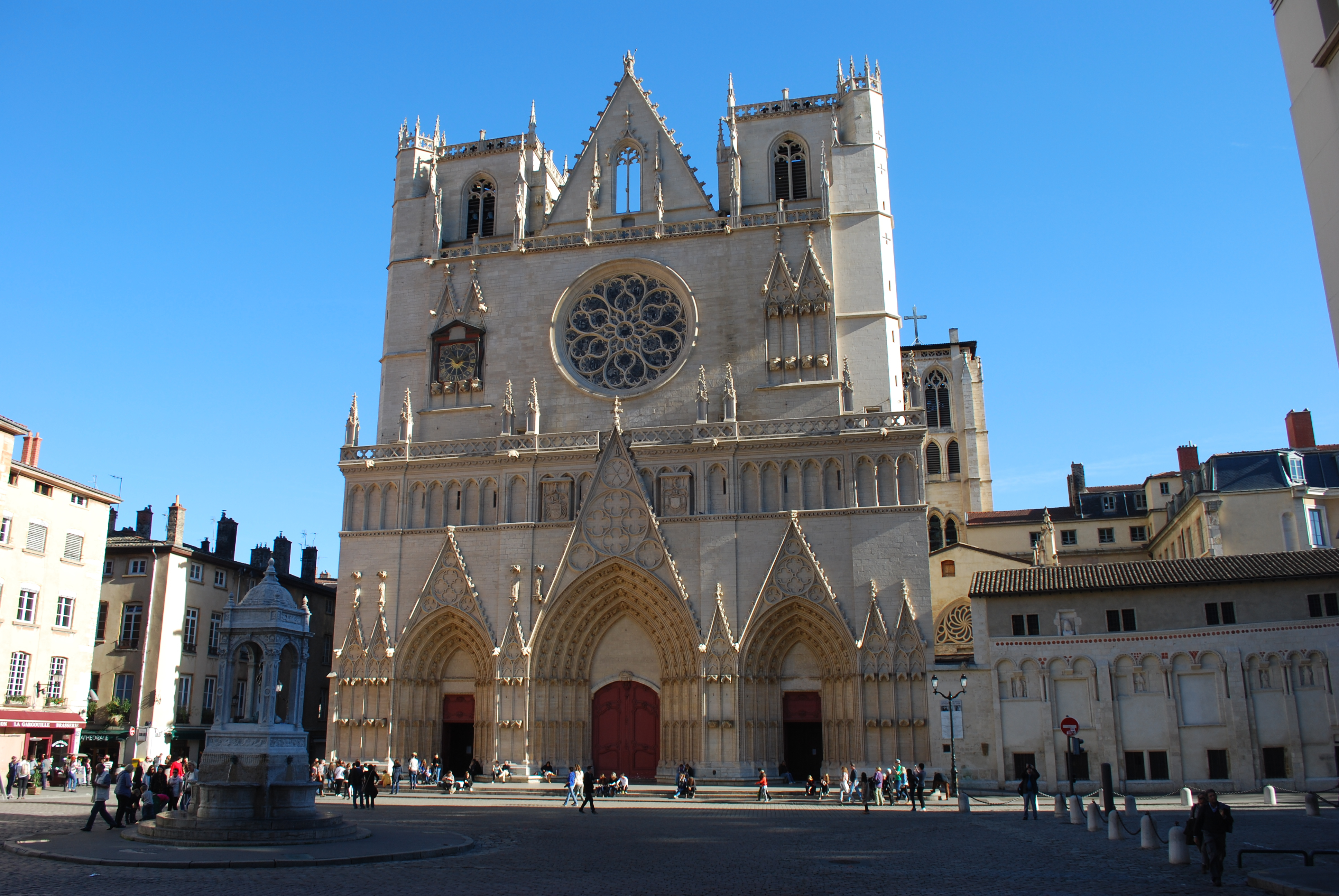 Vue de Lyon.